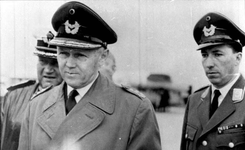 Zentralbild 12.7.1960 Kammhubers Adjutant in die Deutsche Demokratische Republik übergetreten Der Adjutant Kammhubers, Hauptmann von Gliga, der in die Deutsche Demokratische Republik übergetreten ist, enthüllte am 12.7.1960 in einem Fernsehgespräch mit dem militärpolitischen Mitarbeiter des Staatlichen Rundfunkkomitees, Dr. von Frankenberg, weiter Einzelheiten der Bonner Angriffspläne. Der Inspekteur der Bonner Luftwaffe, Generalleutnant Kammhuber (Vordergrund links) mit seinem ehemaligen Adjutanten, Hauptmann [Adam] von Gliga (rechts).